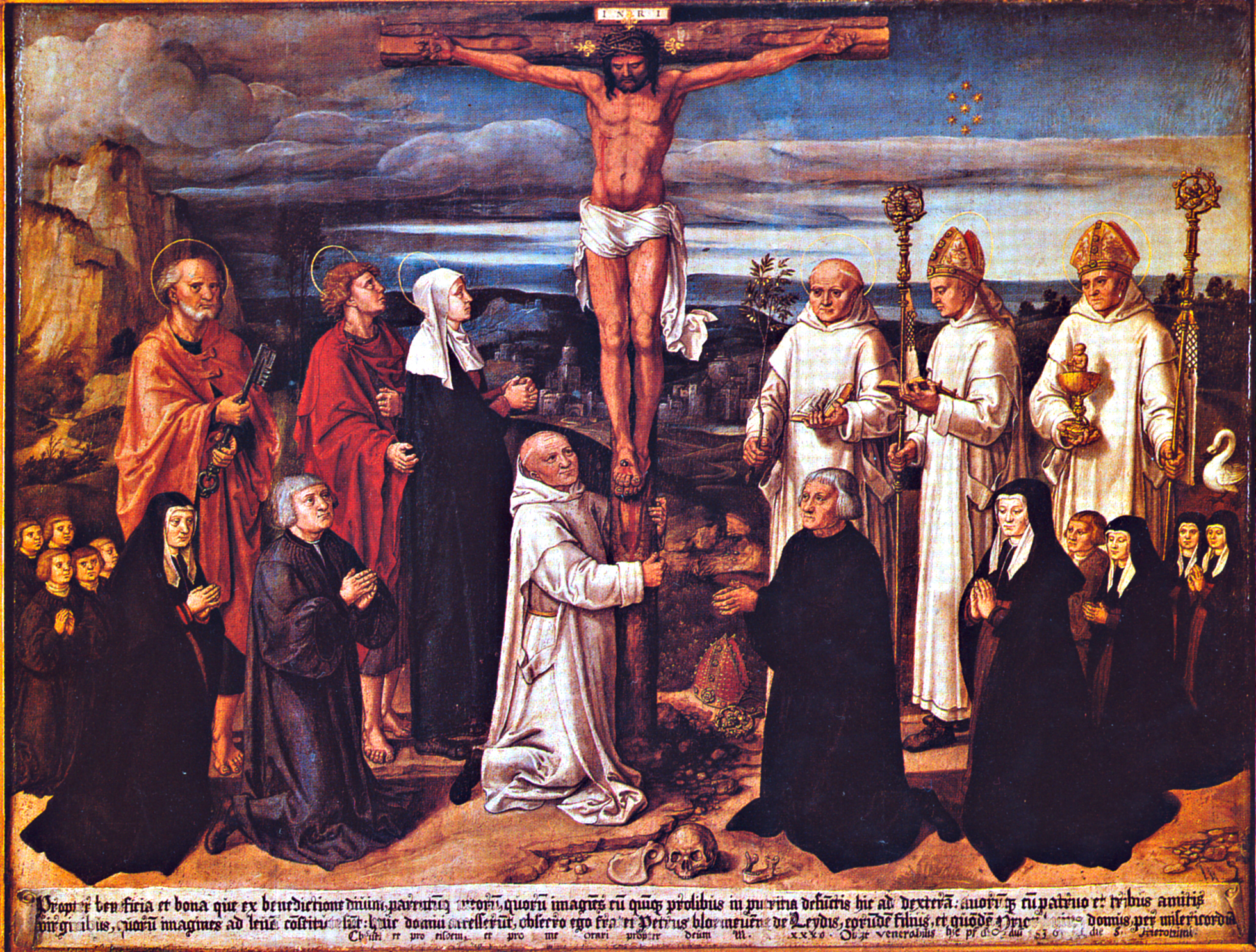 Anton Woensam, Christus am Kreuz, Köln 1535